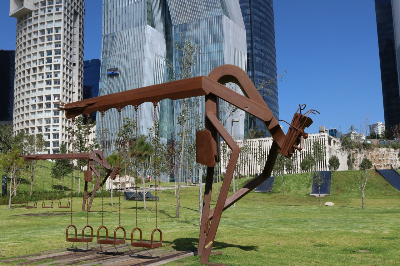 Columpio con un diseño abstracto, para que los niños puedan disfrutar y divertirse con el arte en el Parque La Mexicana.